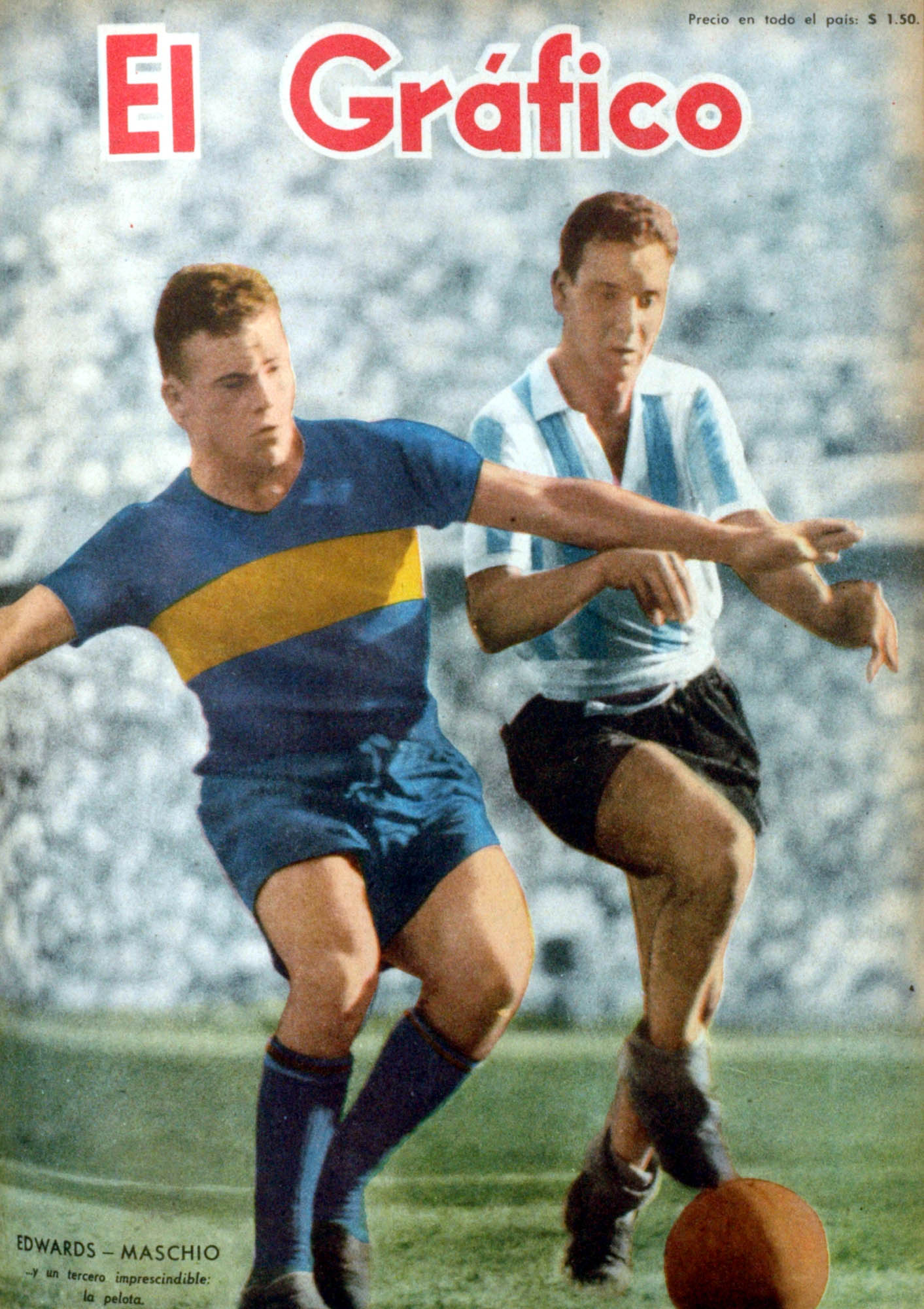 El Grafico del 13 de Enero de 1956. Edicion 1899